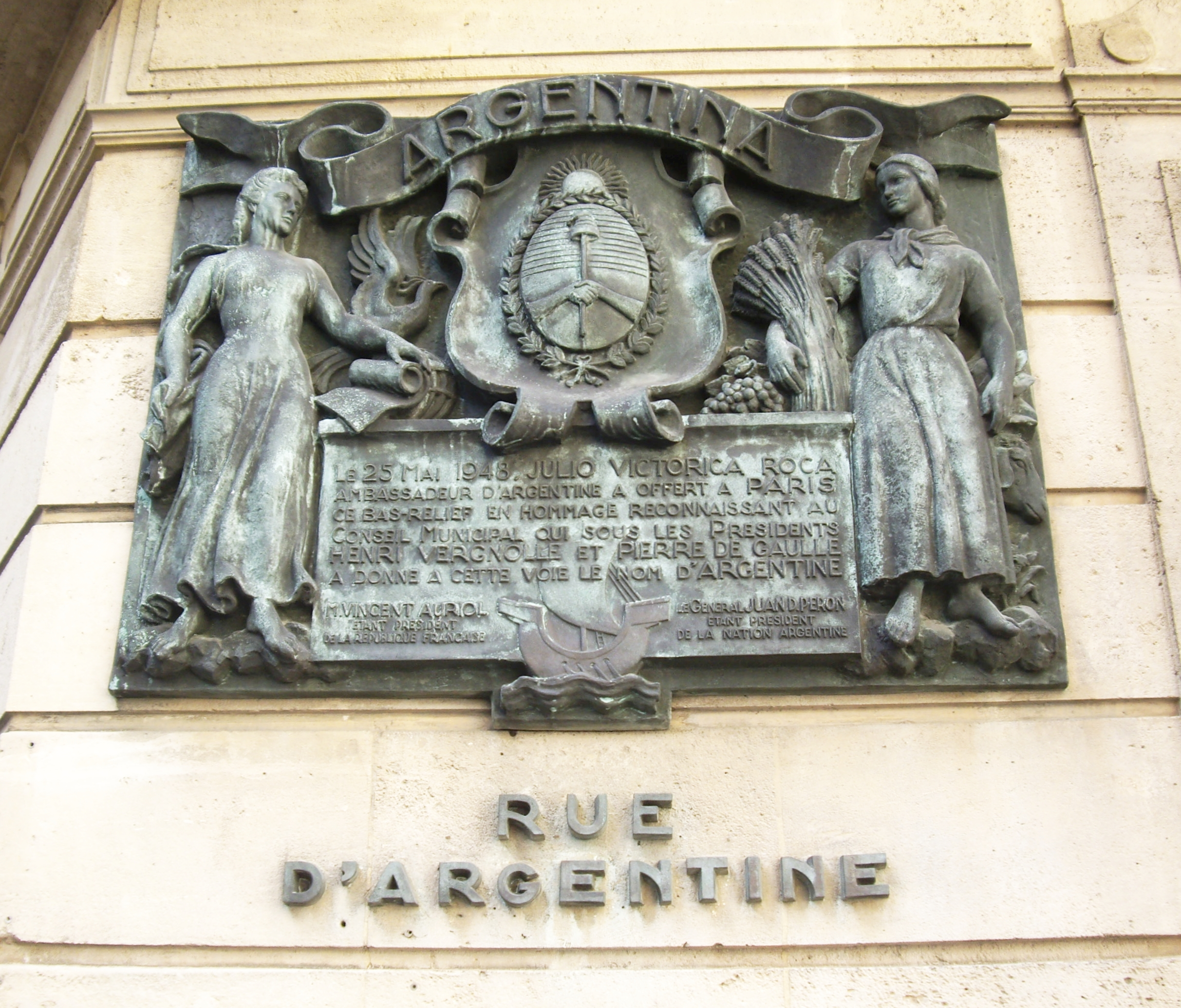 Plaque commémorative, 1 rue d'Argentine, Paris 16e.« Argentina. Le 25 mai 1948, Julio Victorica Roca, ambassadeur d'Argentine, a offert à Paris ce bas-relief en hommage reconnaissant au conseil municipal qui, sous les présidents Henri Vergnolle et Pierre de Gaulle, a donné à cette voie le nom d'Argentine, M. Vincent Auriol étant président de la République française, le général Juan D. Perón étant président de la Nation argentine. »